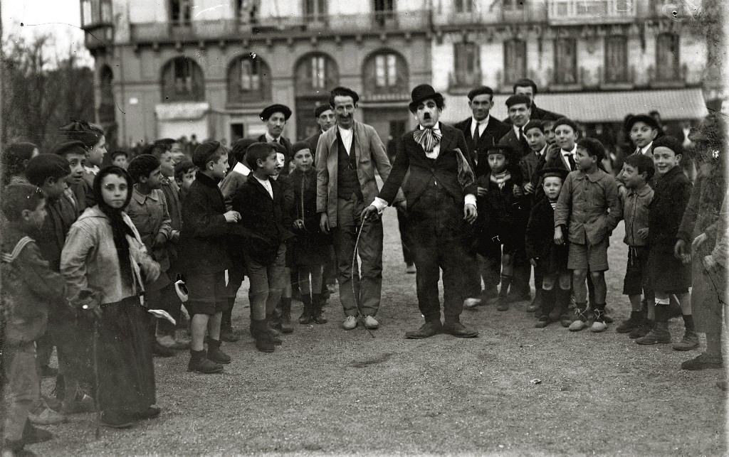 Título original: Hombre disfrazado de Charlot delante del Gran Casino de San Sebastián (1/2) Localización: San Sebastián (Guipúzcoa)